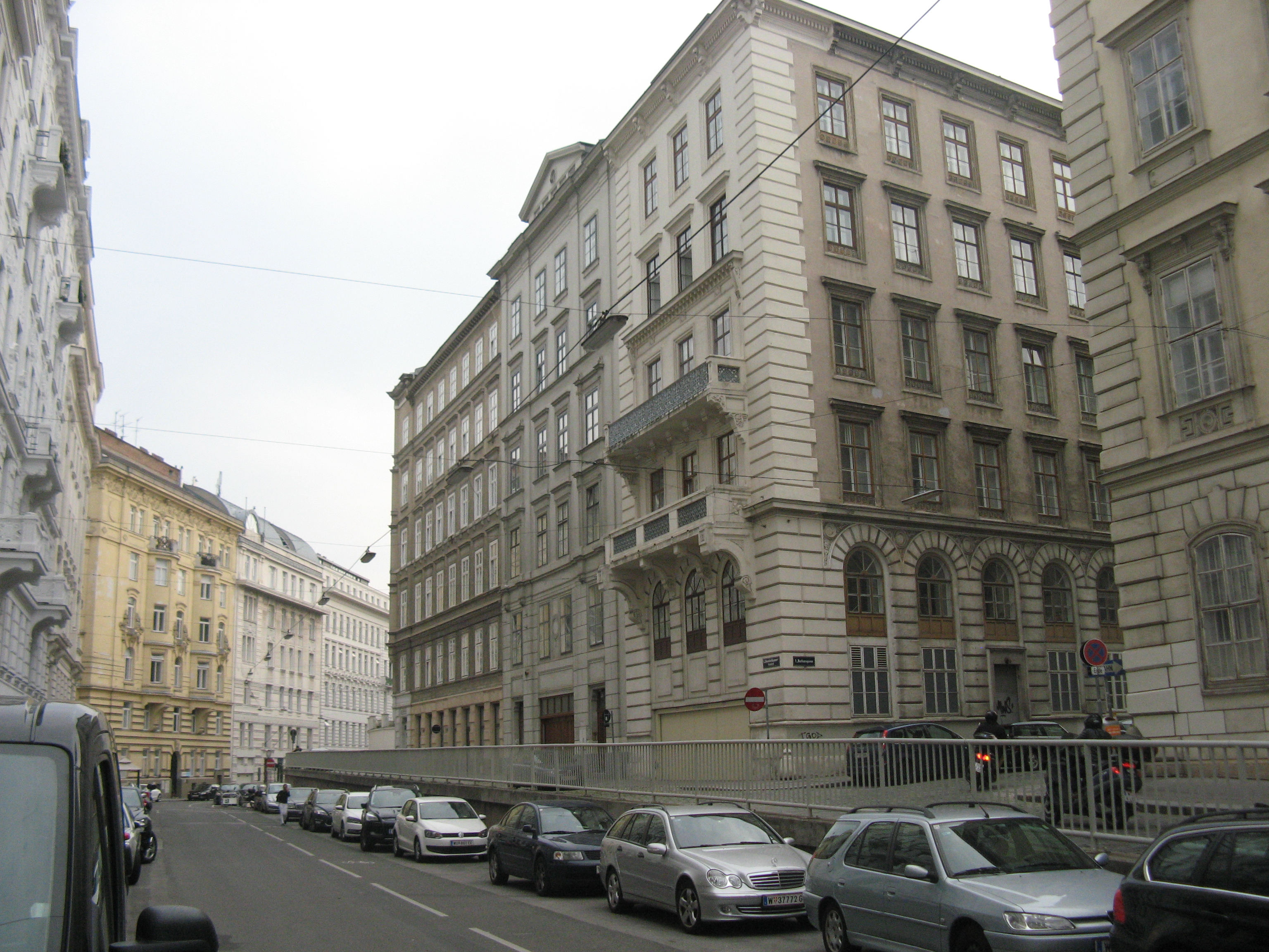 Dominikanerbastei